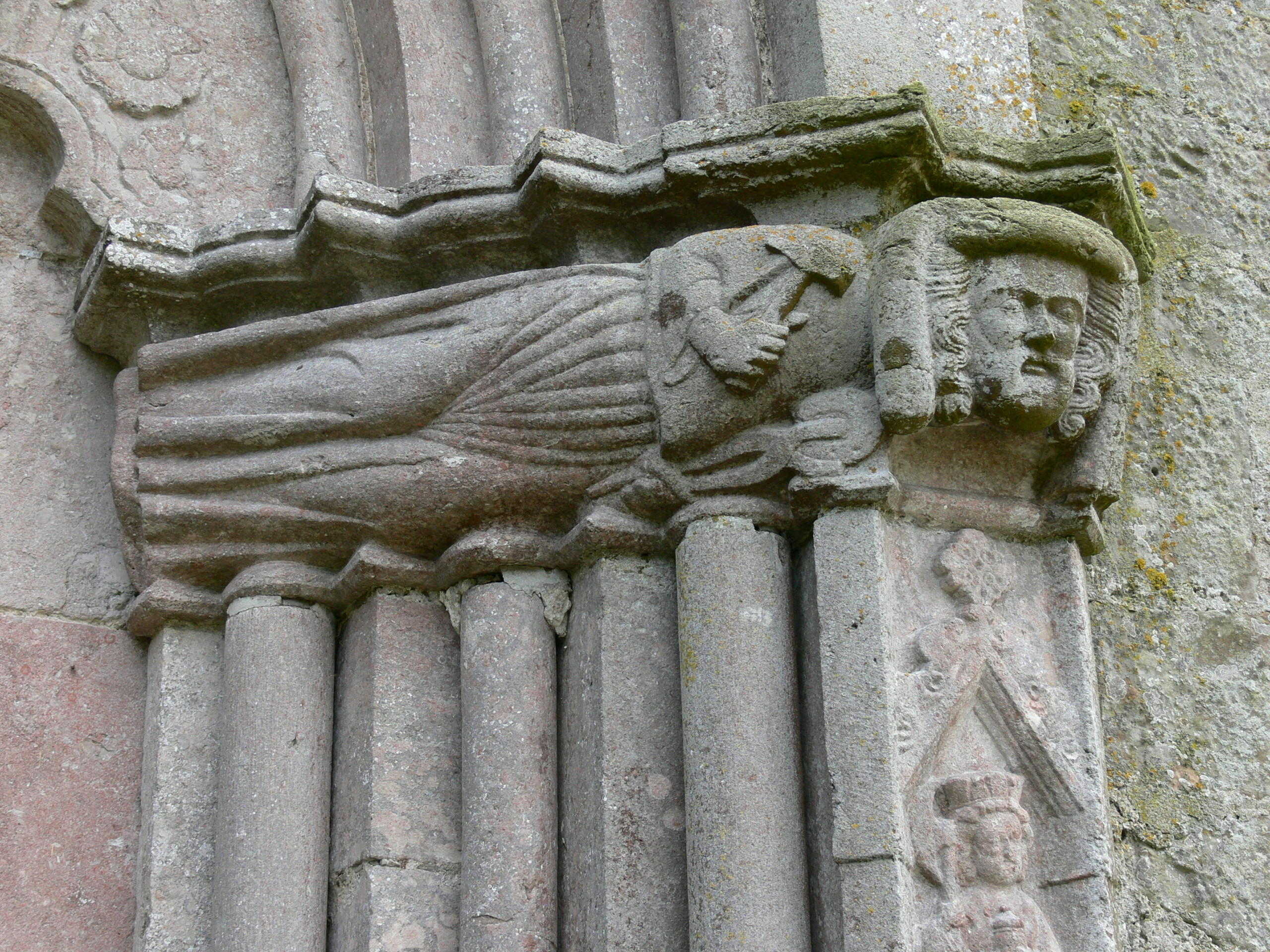 Öja kyrka auf Gotland. St.Eligius am Nordportal ( 14.Jhdt.)